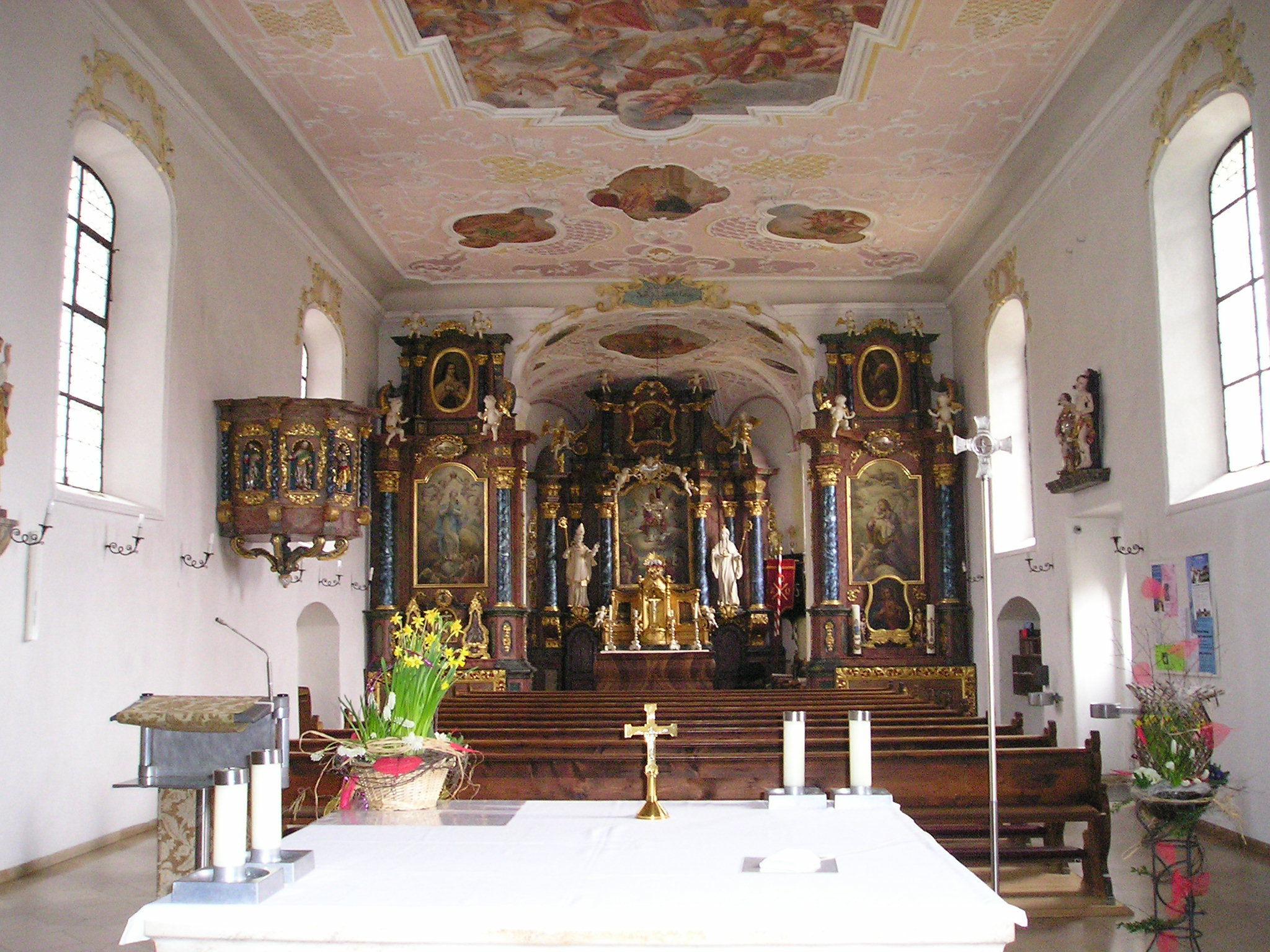 Kirche Meckenhausen, Landkreis Roth, Inneres der alten Kirche nach Umbau